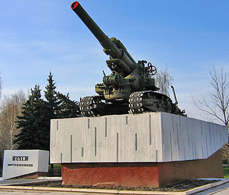 Памятник воинам-артиллеристам в Мемориальном парке в Коломне.